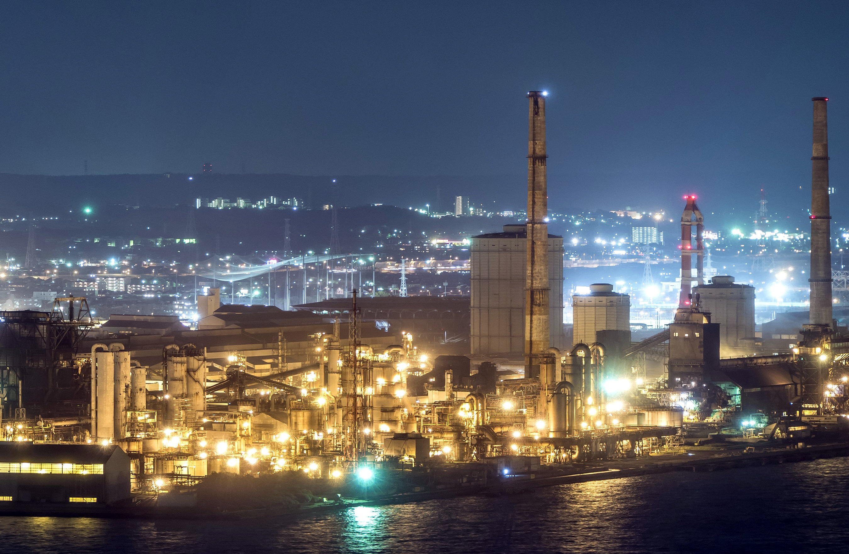 CC-BY-2.0 で Flickrにアップロードされていた画像。千葉ポートタワーからの工場夜景